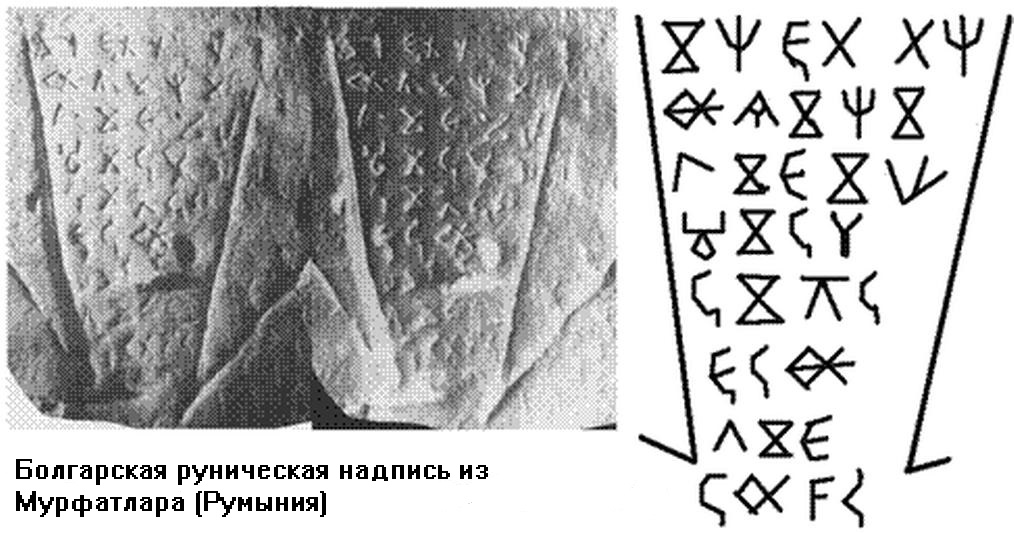 Пример болгарских руны из Мурфатлара (Румыния) из книги Алано-Древнеболгарское письмо, автор Ж. Войников